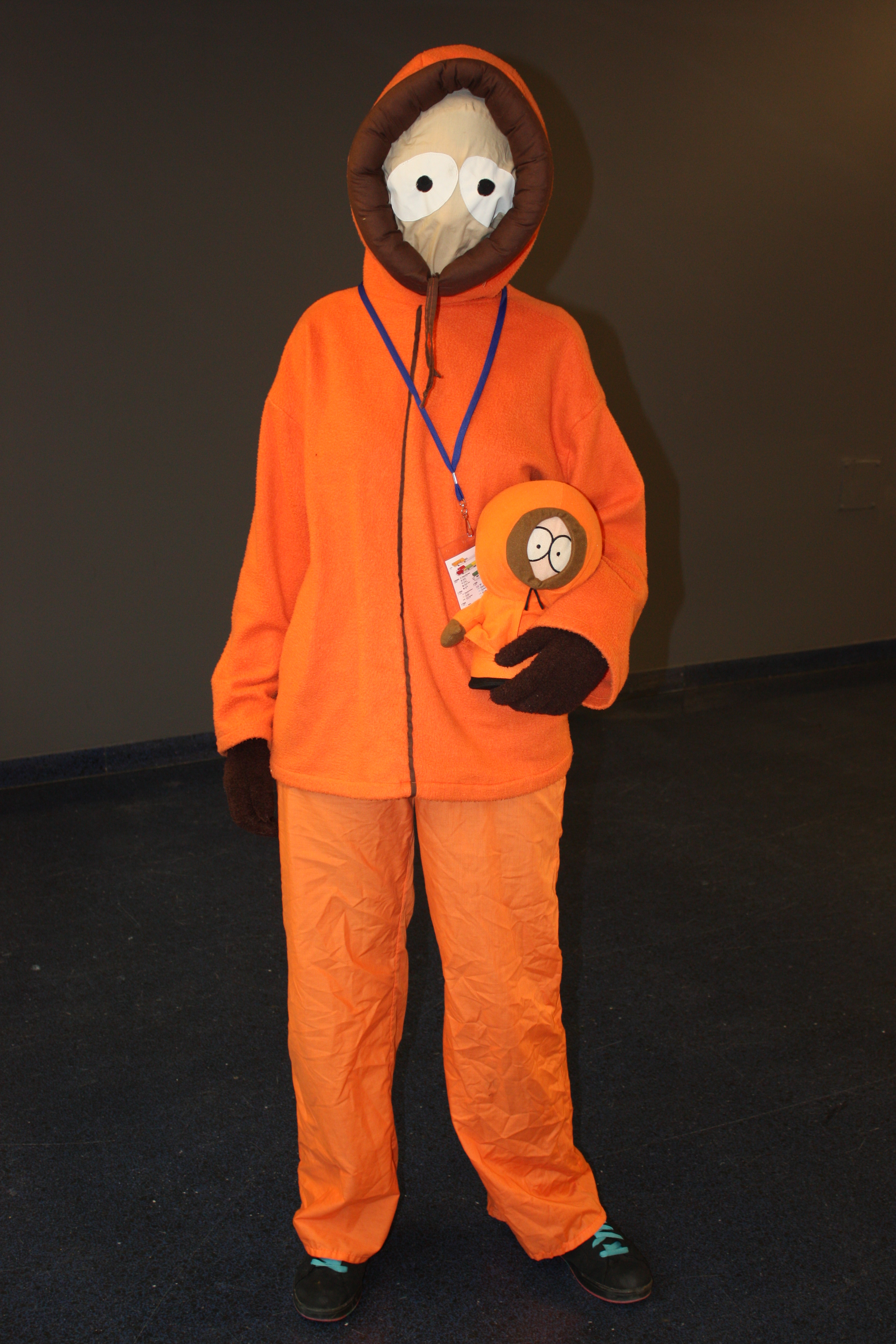 Otakuthon 2014: Kenny